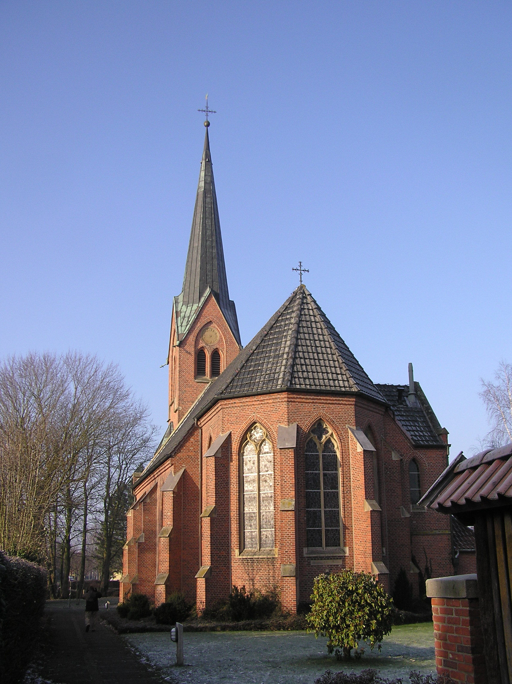 kath. Kirche St. Marien in Badbergen, Samtgemeinde Artland